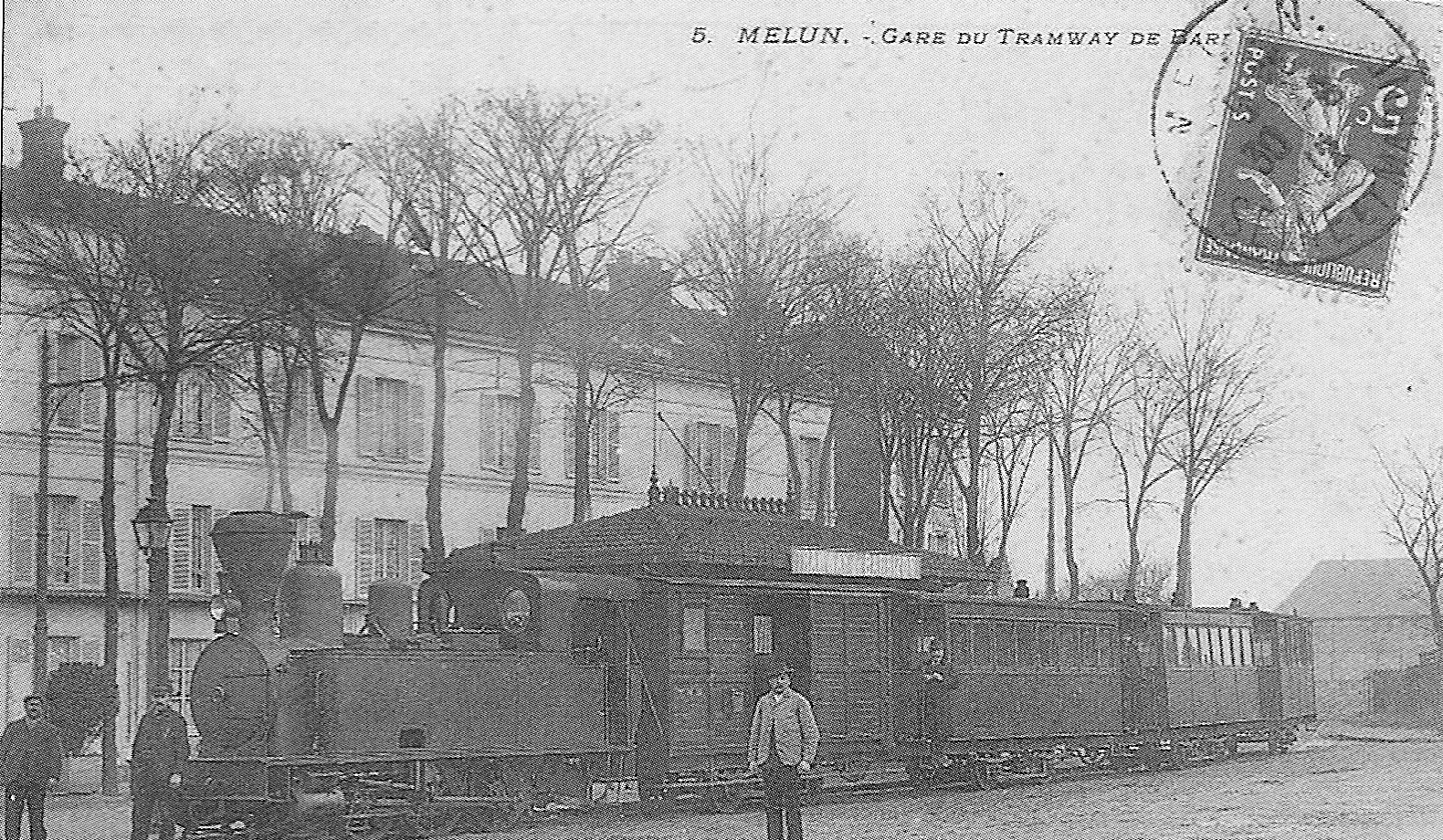 Le tramway de Barbizon - Tramway Sud de Seine-et-Marne - en gare de Melun (Seine-et-Marne, France).